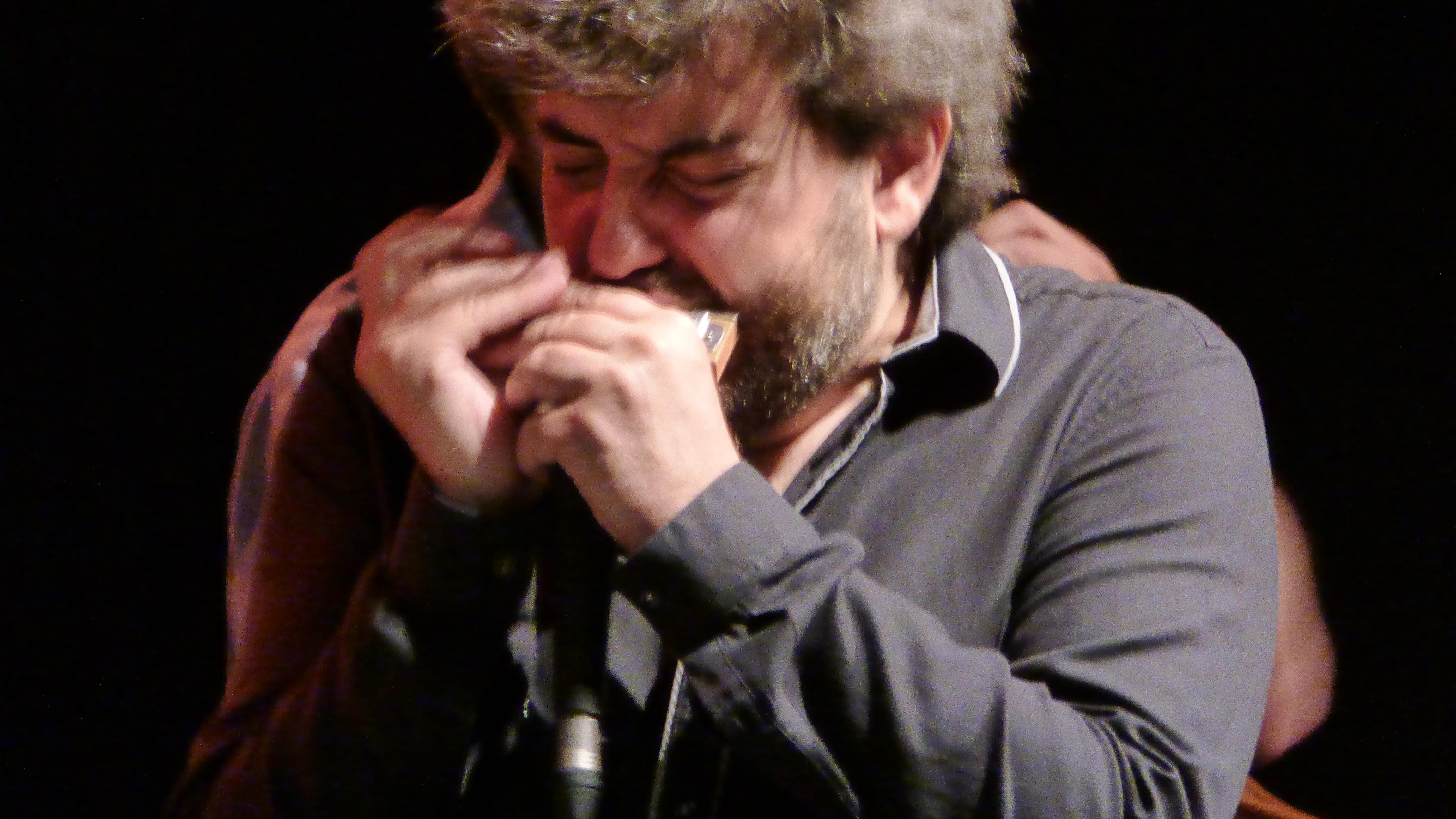 Antonio Serrano, primer plano. Concierto Festival Internacional de Jazz de San Javier, 2 de julio de 2016